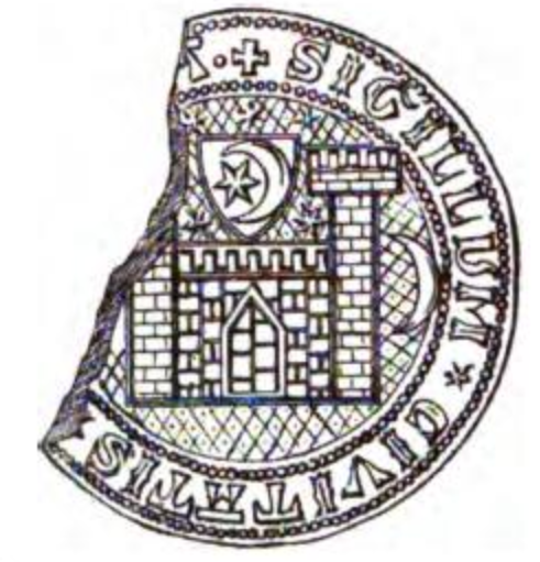 Ottův slovník naučný - Č. 2617. Pečeť města Loun z XIV. stol.